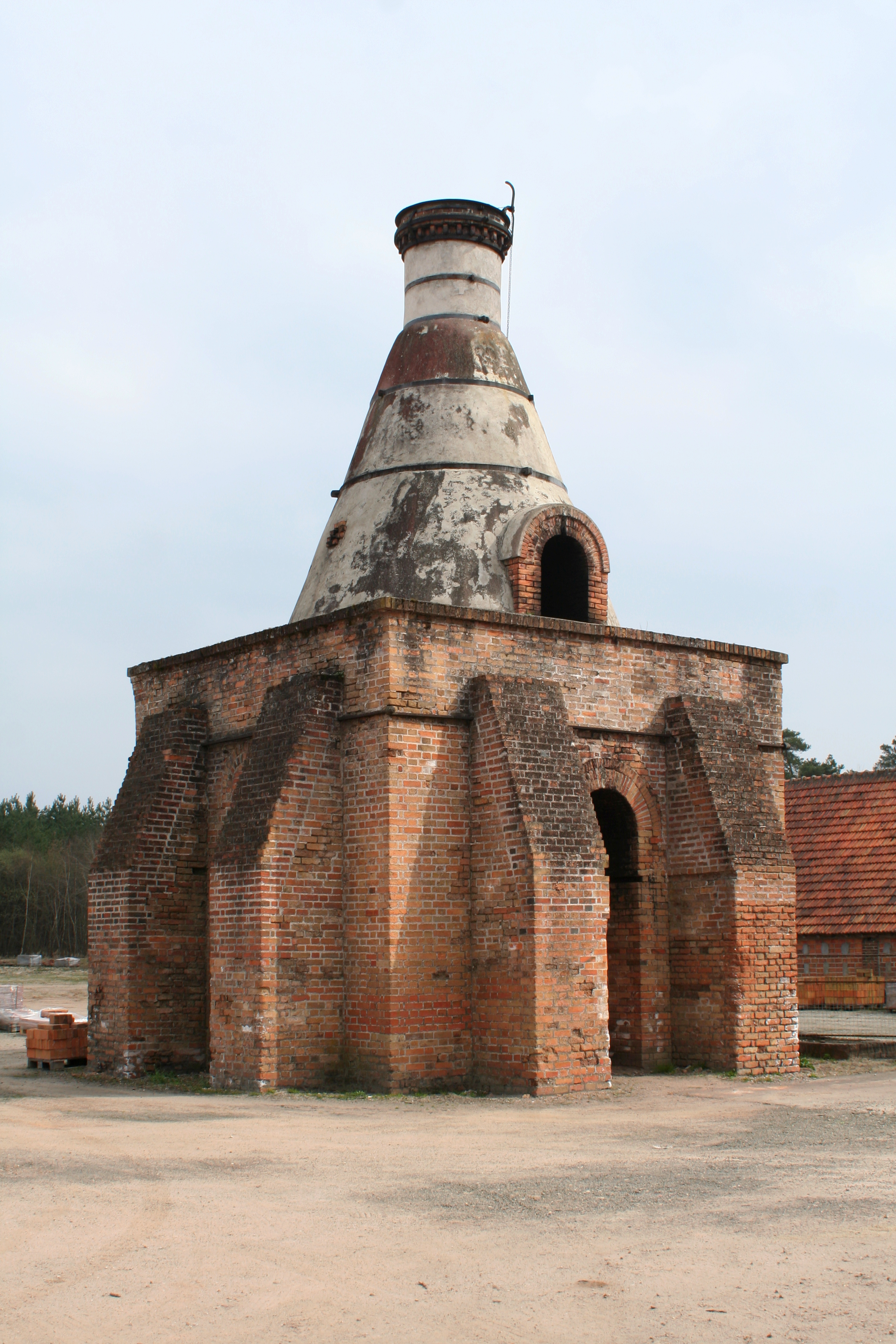 Vieux four à briques de la briqueterie de la Bretêche, Ligny-le-Ribault. Inscrit monument historique. It is indexed in the Base Mérimée, a database of architectural heritage maintained by the French Ministry of Culture, under the references PA45000005 and IA00013096 .